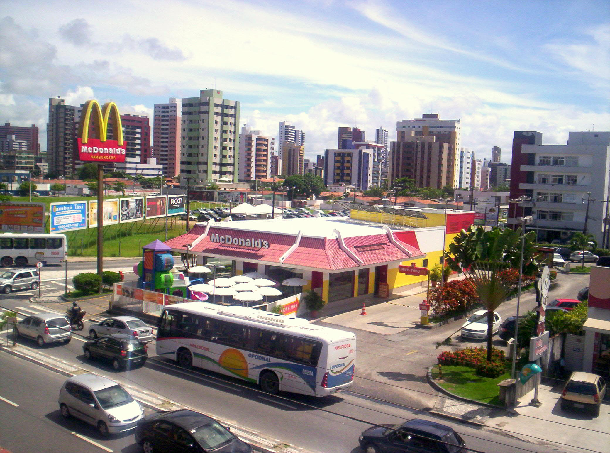 Fotos Corriqueiras